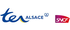 Logo von TER Alsace, Frankreich